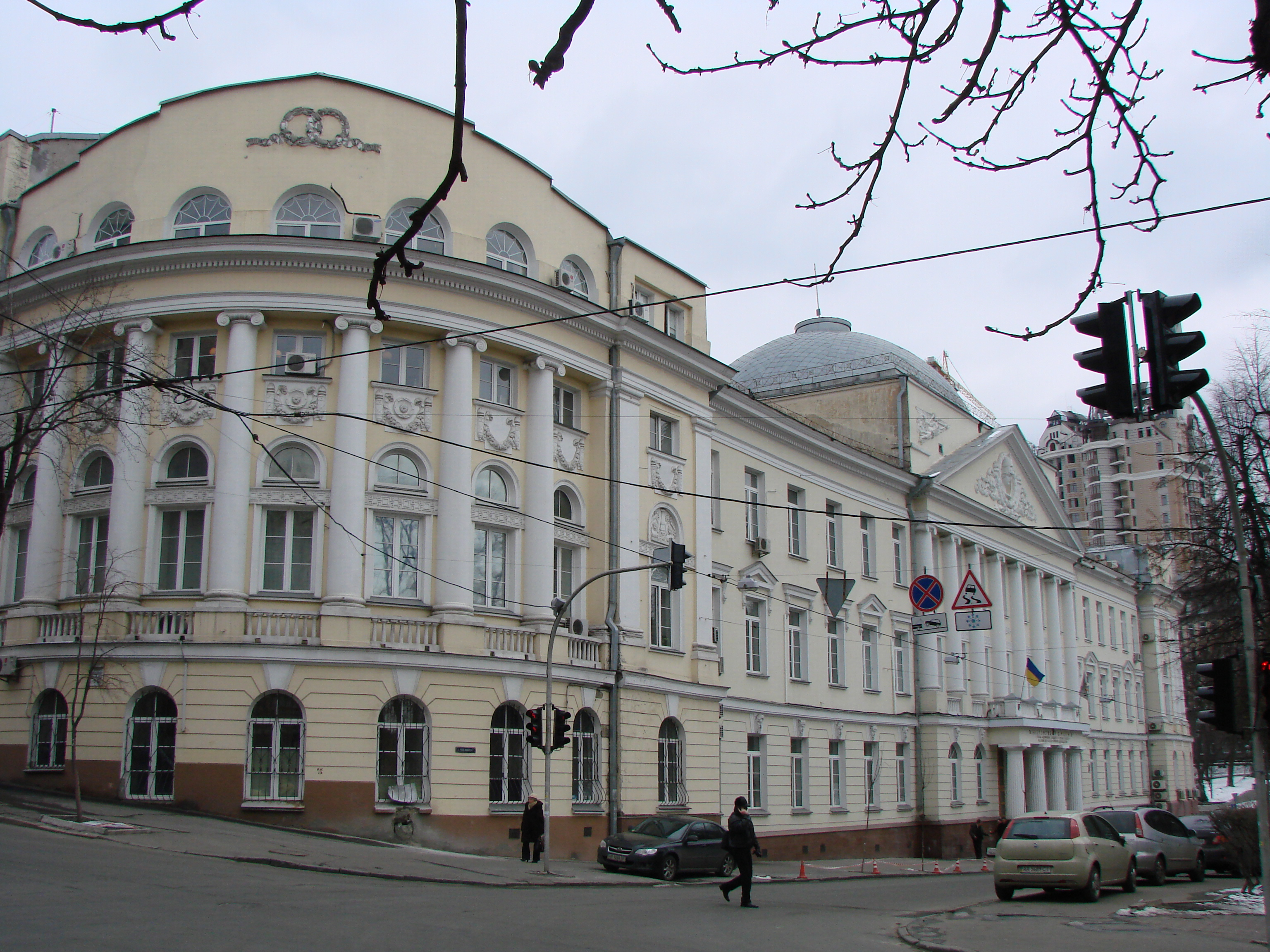 Олеса Гончара, 55a